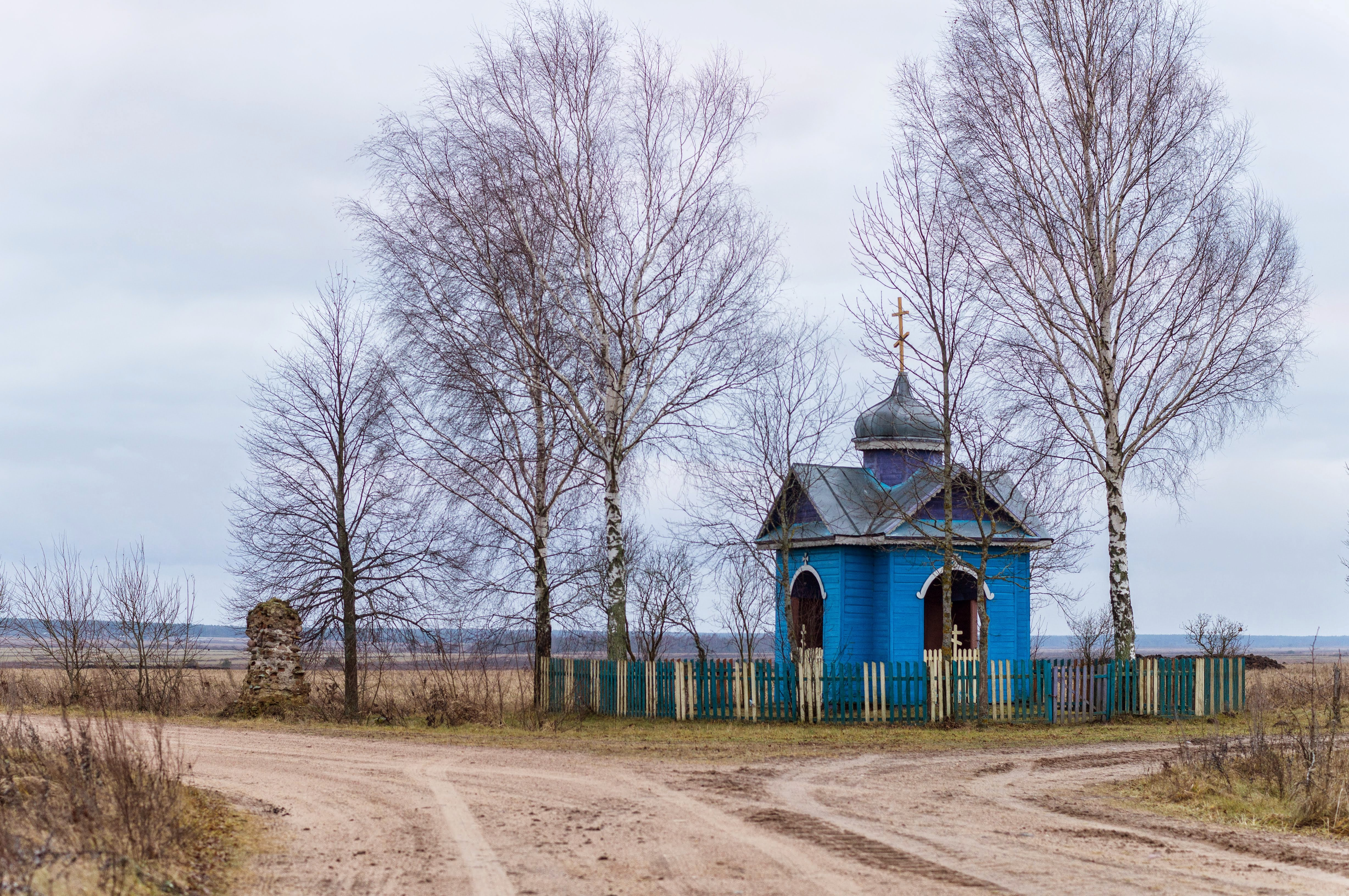 Капліцы ля Мільчы